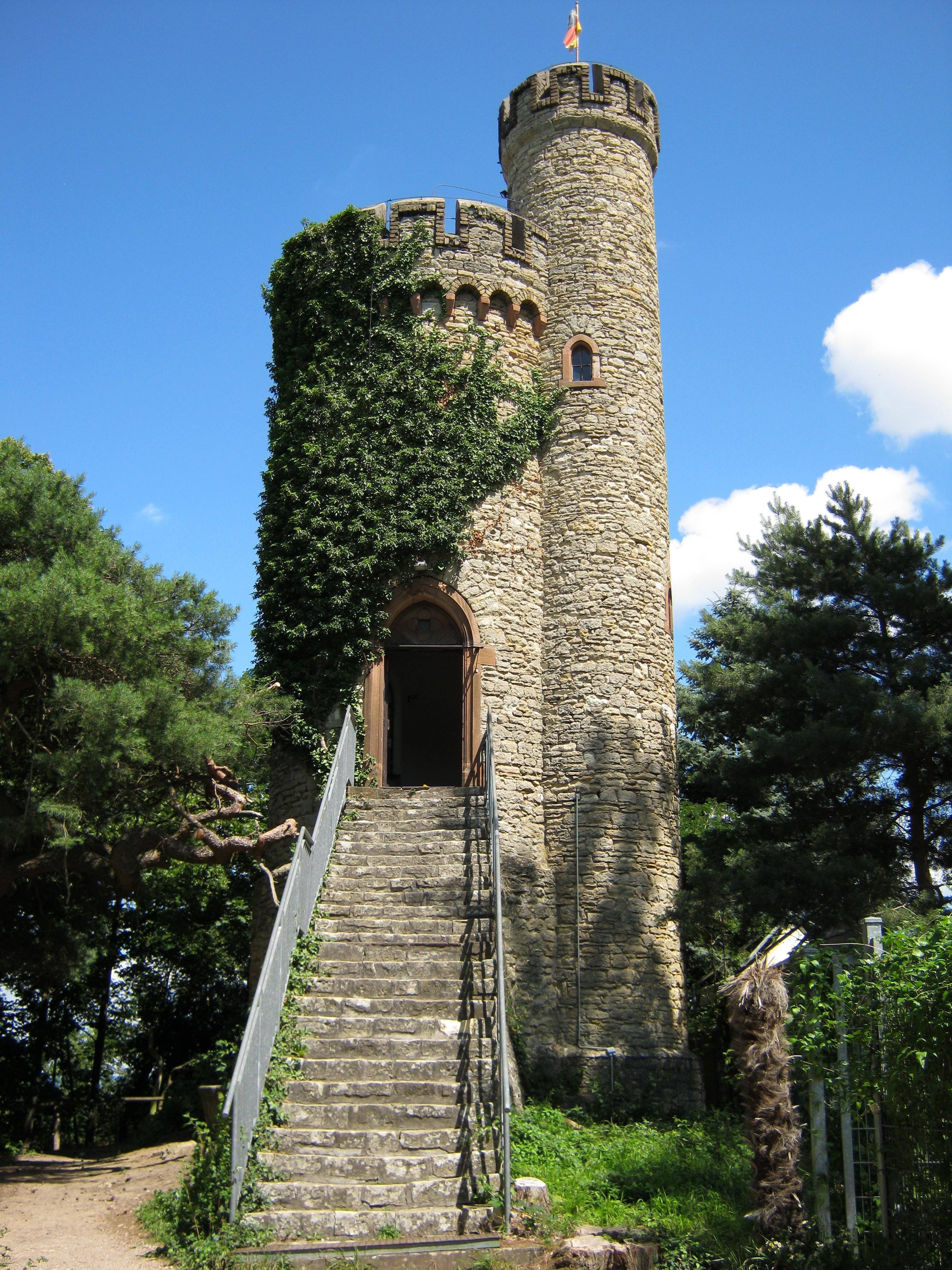 Der Lennebergturm bei Budenheim.